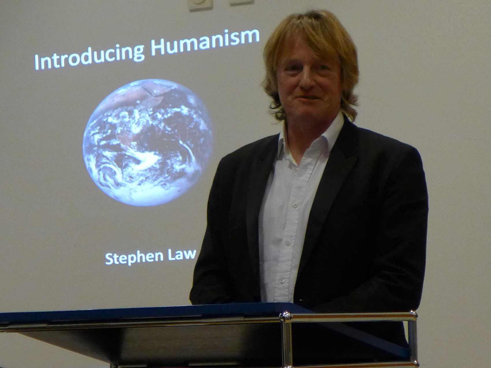 Aufnahme vom 26.11.14 im Forschungsinstitut für Philosophie Hannover während eines öffentlichen Vortrags im Projekt November der Wissenschaft 2014